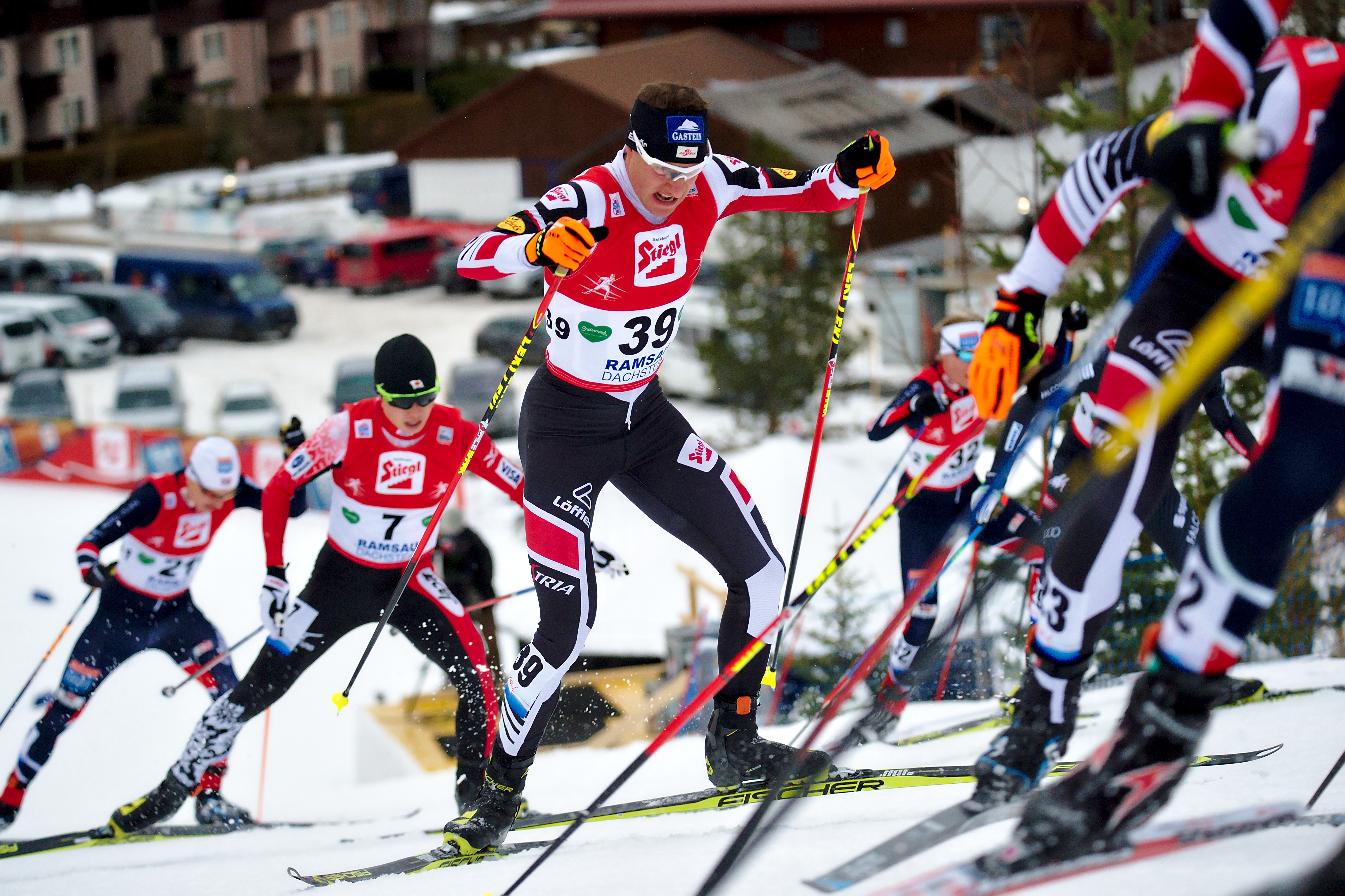 10km Gundersenlauf am Sonntag, 18.12.2016